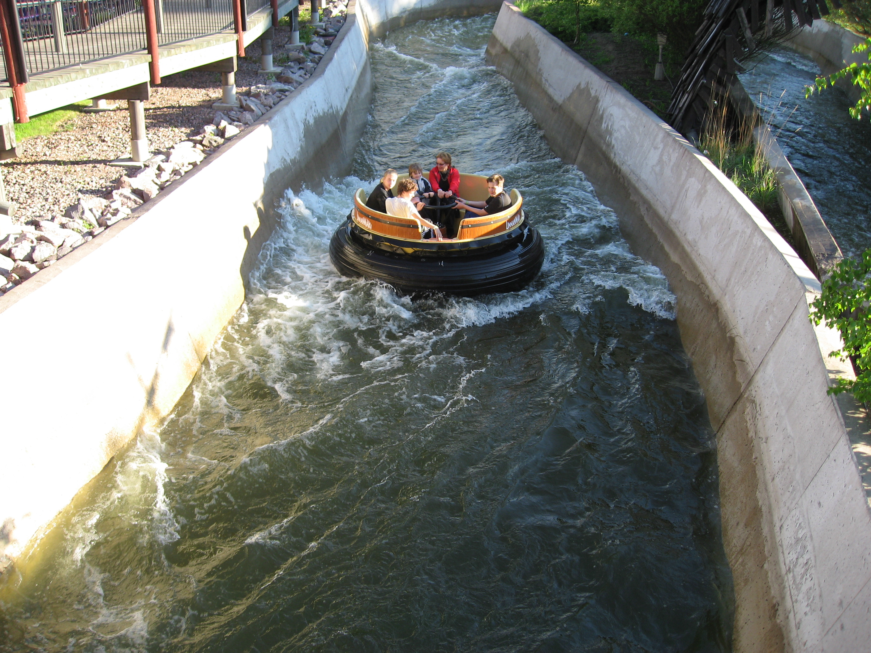 Vonkaputous or Hurjakuru on Linnanmäki amusement park in Helsinki, Finland